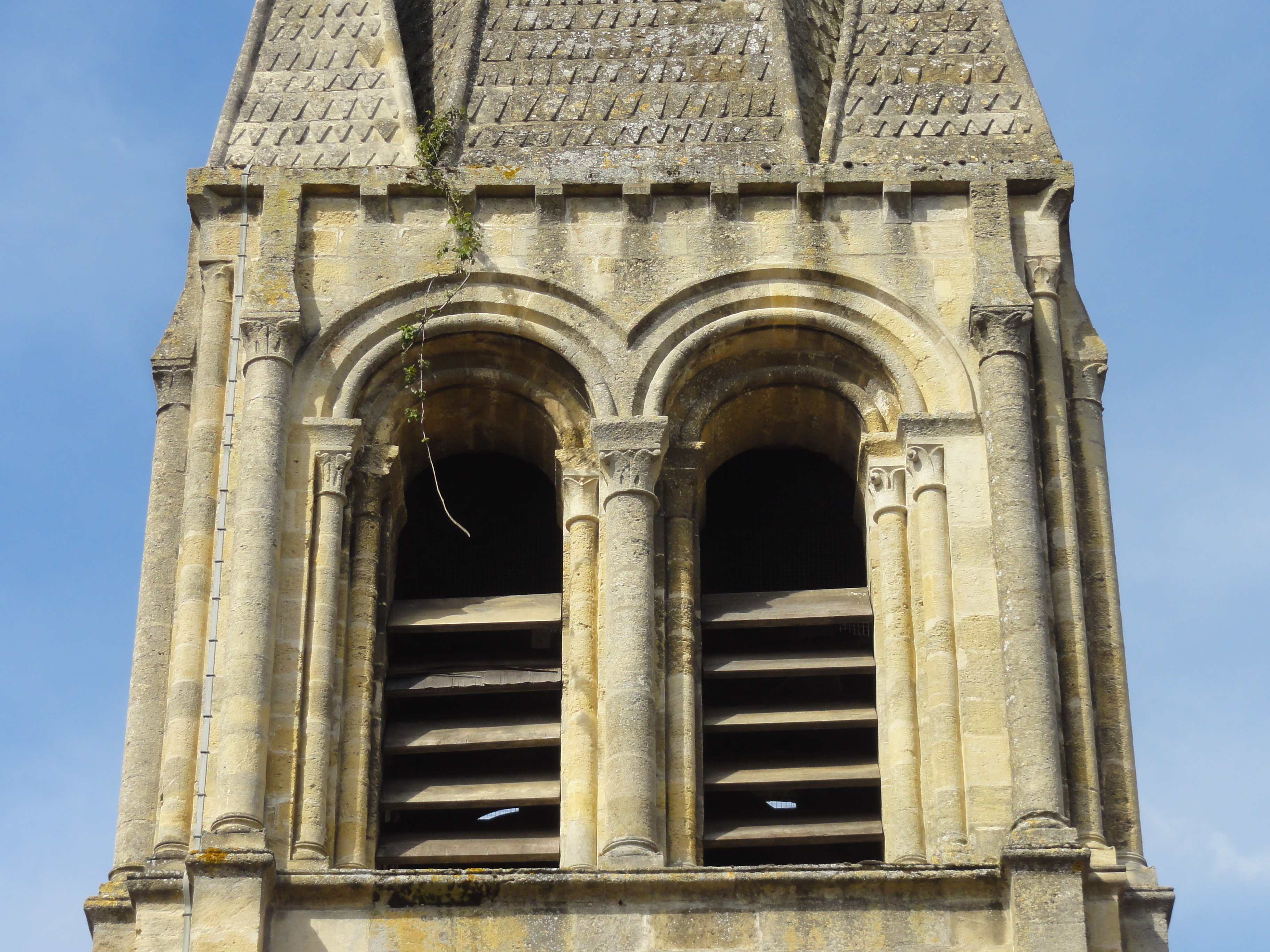 Église Saint-Germain-de-Paris de Hardricourt - voir titre.